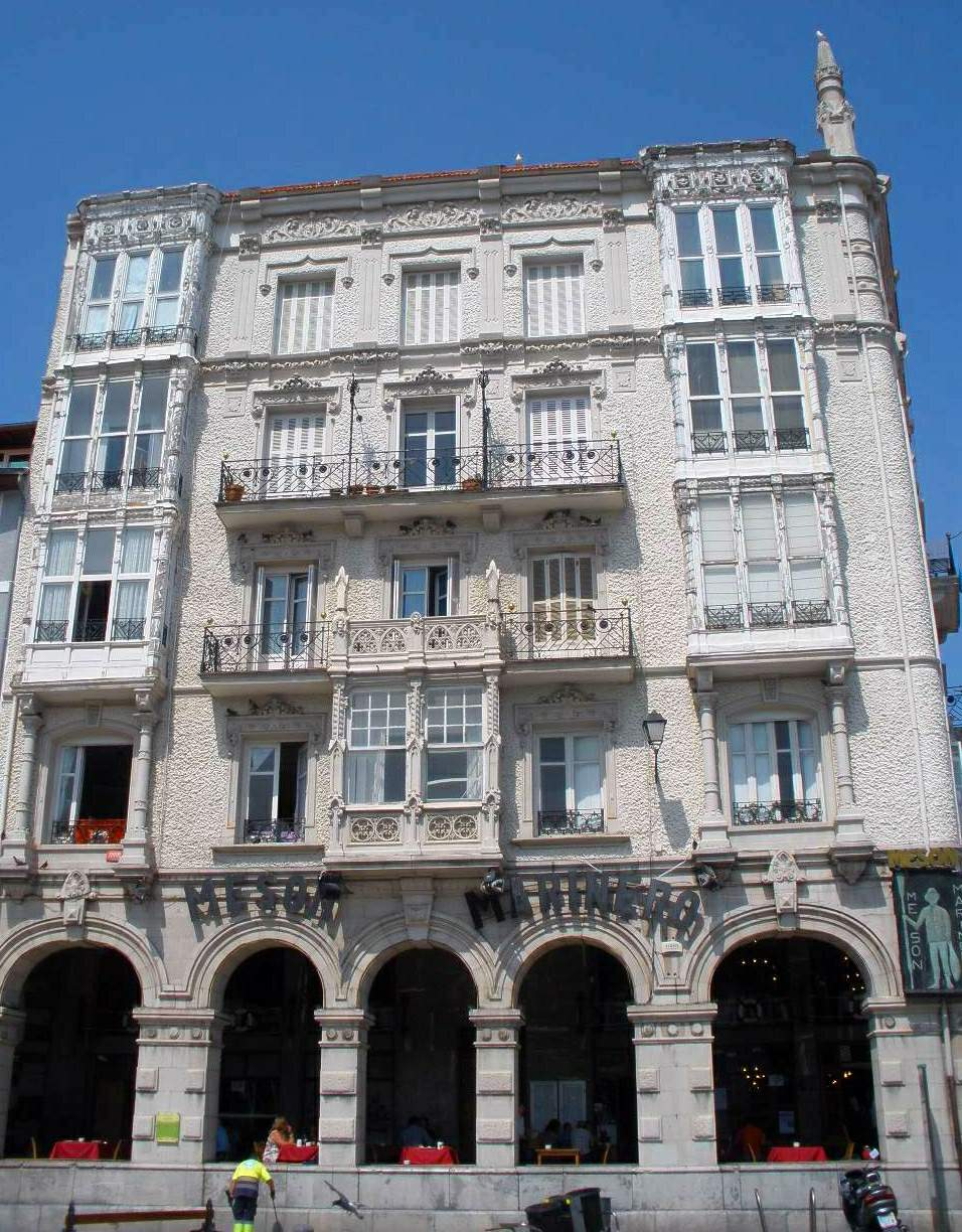 Casa de los Chelines (Castro Udiales)